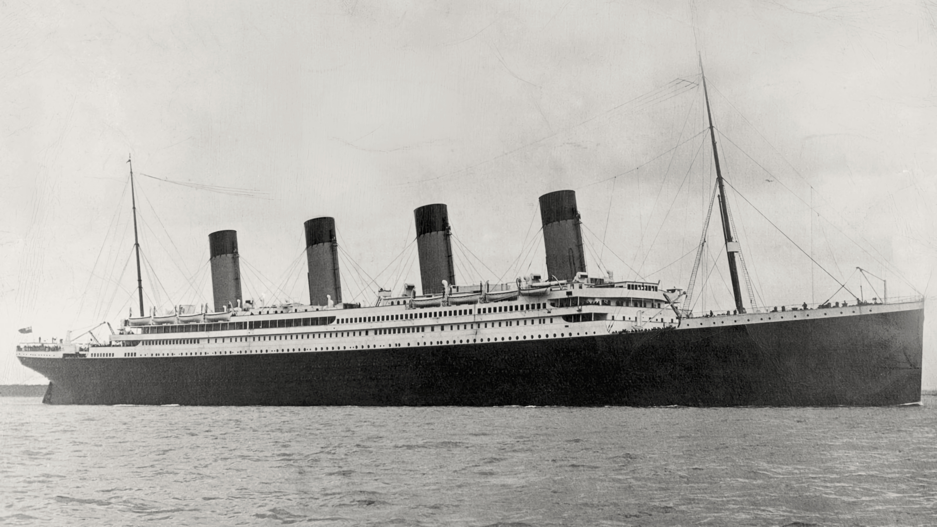 Titanic from the side